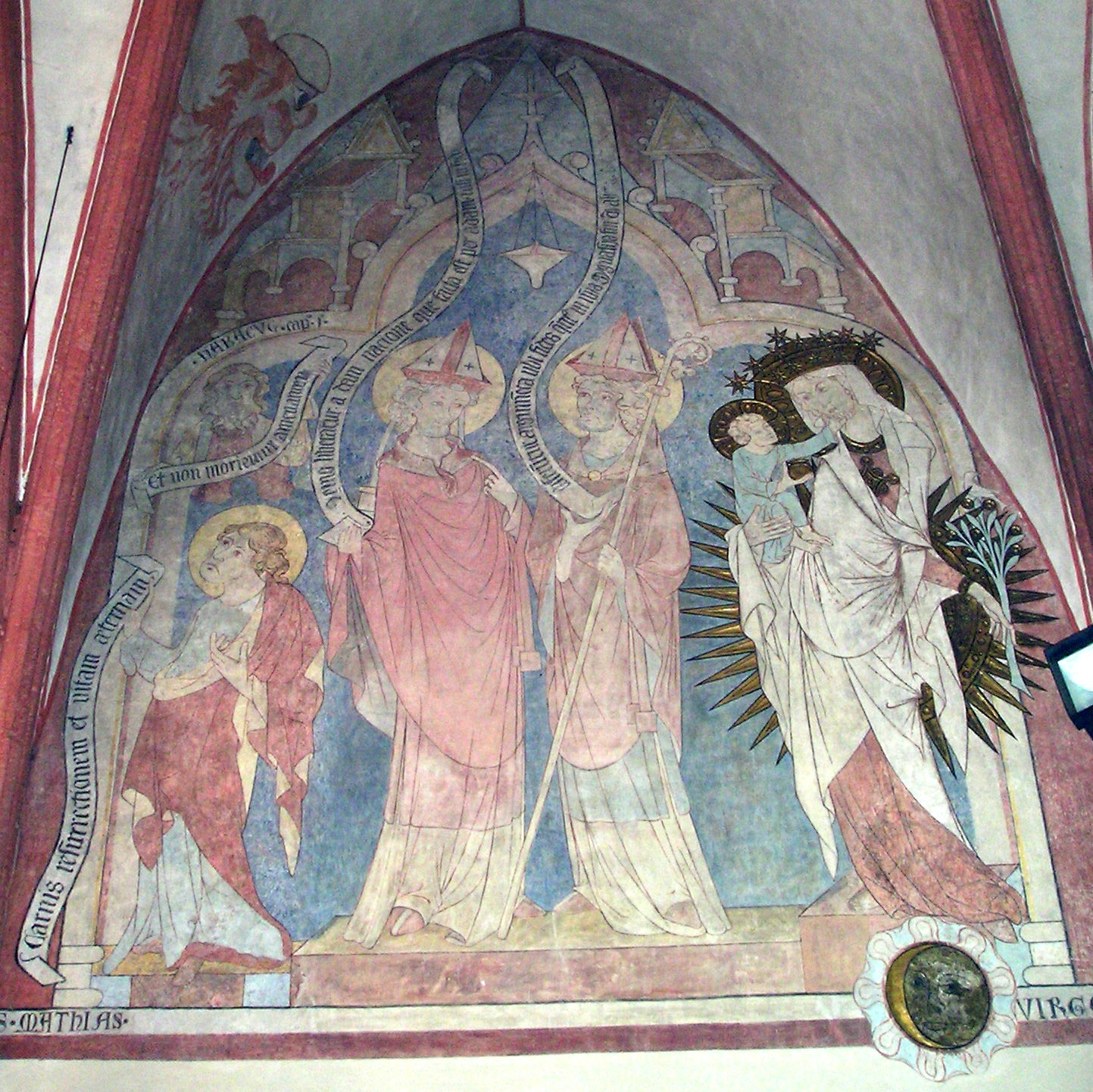 Kirche von Dollnstein im Landkreis Eichstätt, Fresko im Chorraum